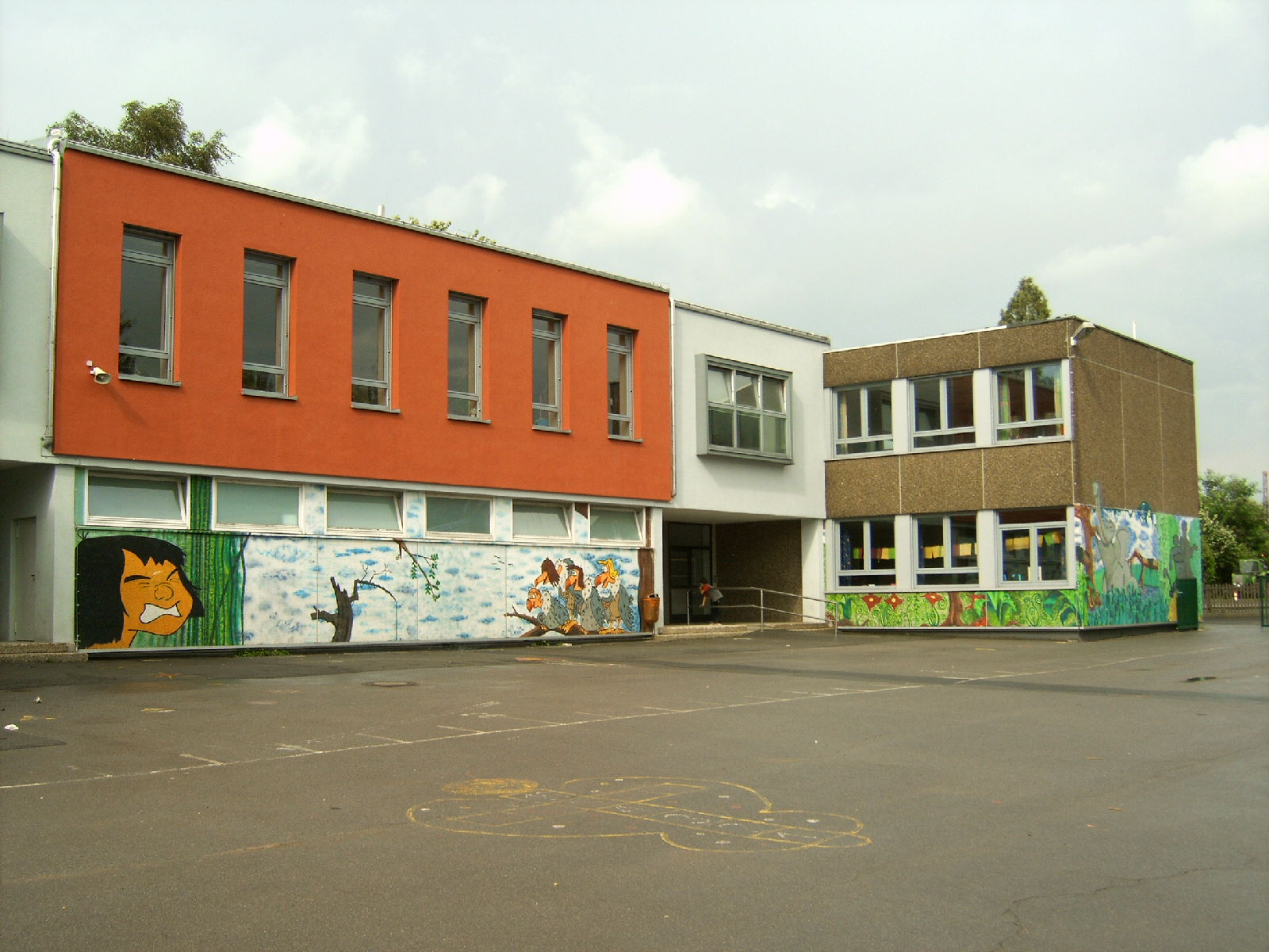 Reichshofschule Westhofen, Schwerte, Deutschland